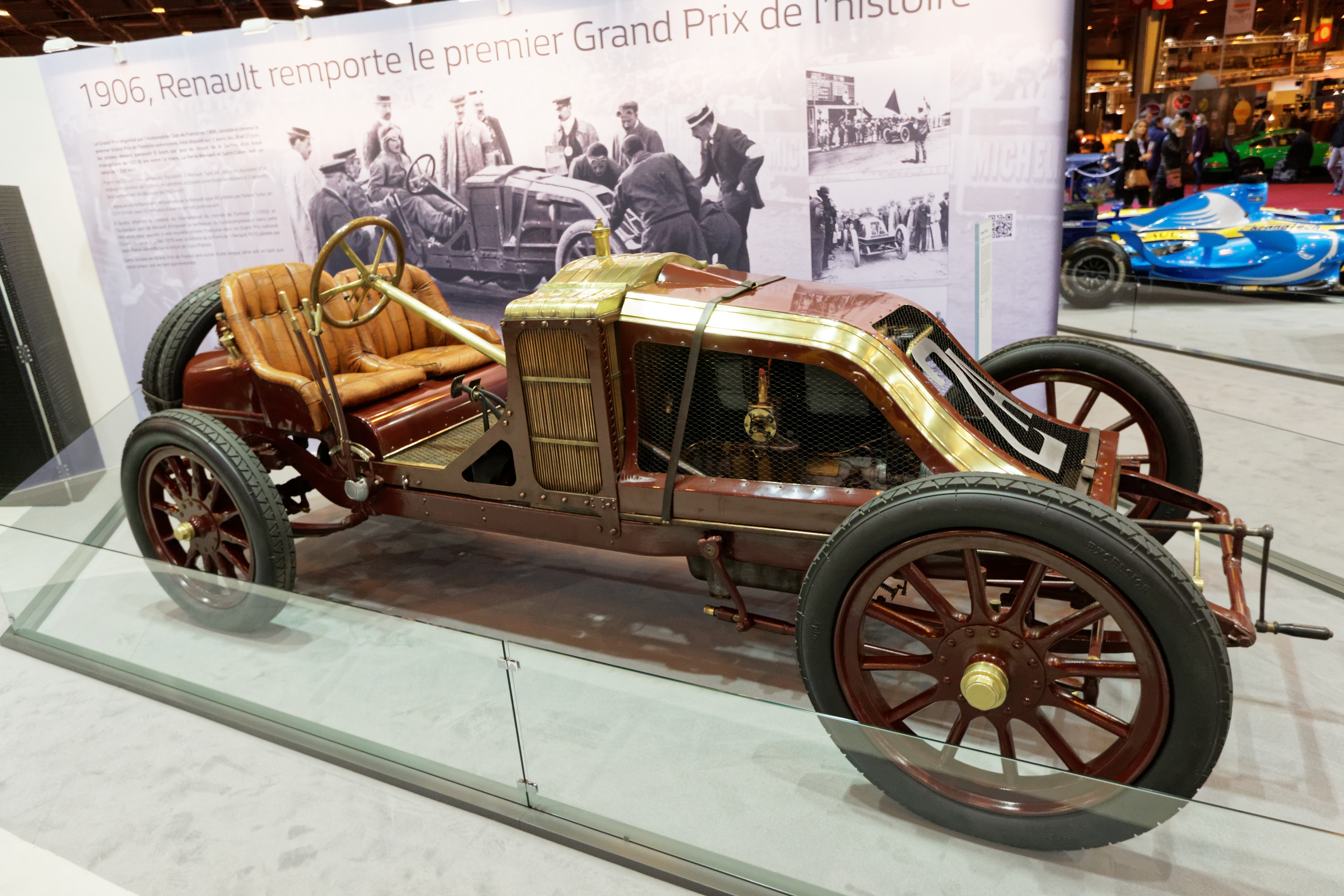 Une Renault Type AK Replica de 1906 exposée lors du salon Rétromobile 2016.